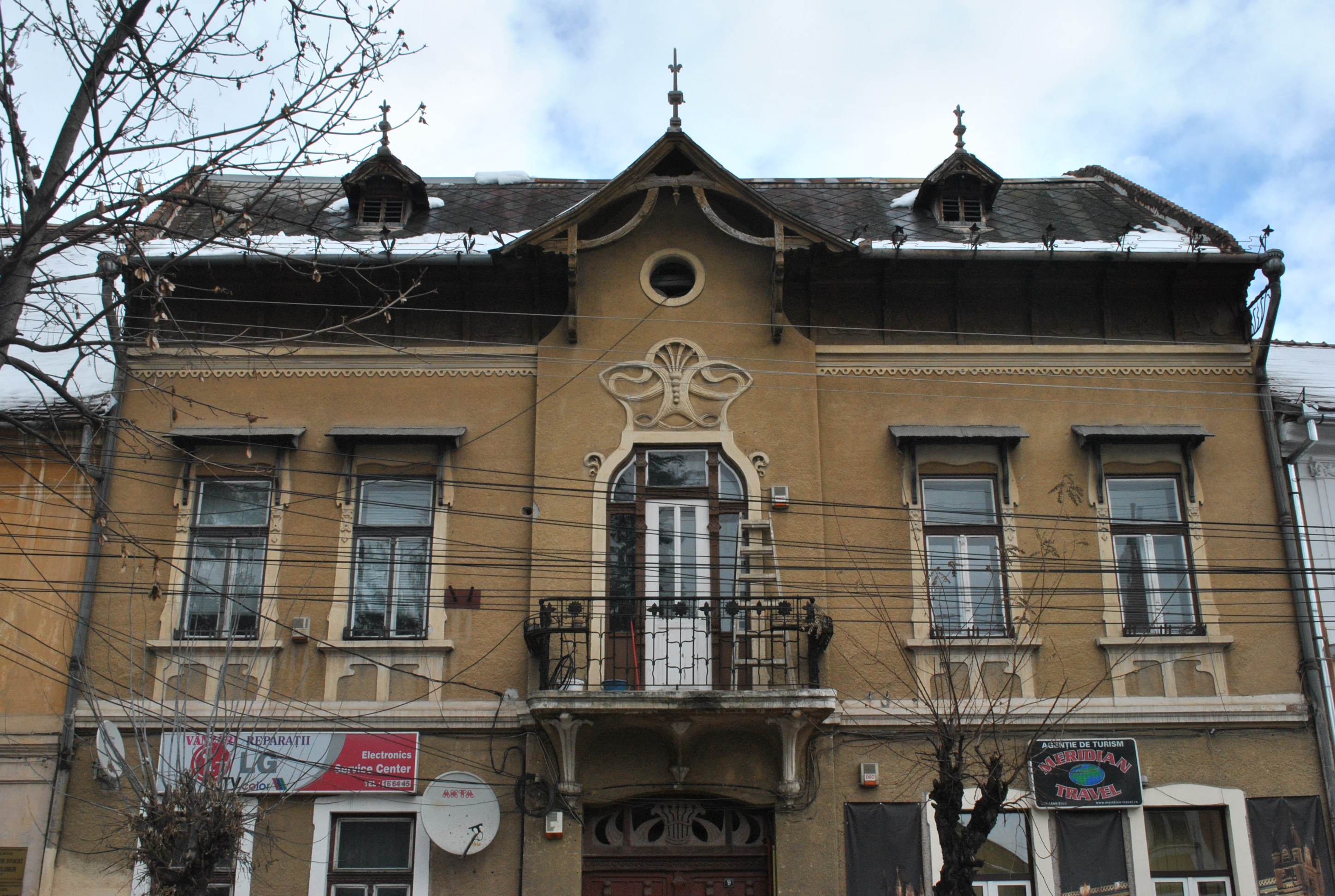 Casă, 1905 - 1910